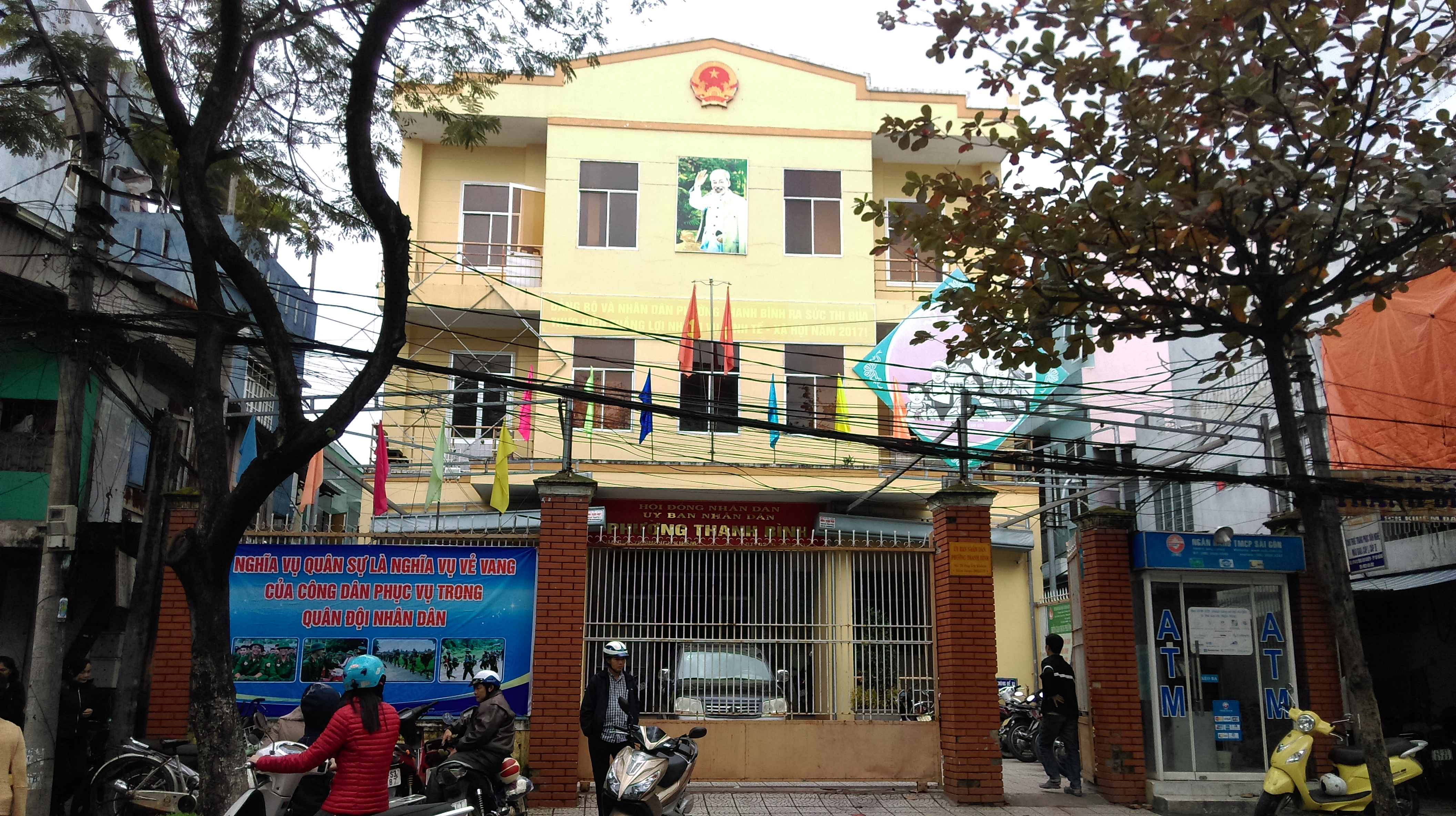 UBND phường Thanh Bình, Hải Châu, Đà Nẵng